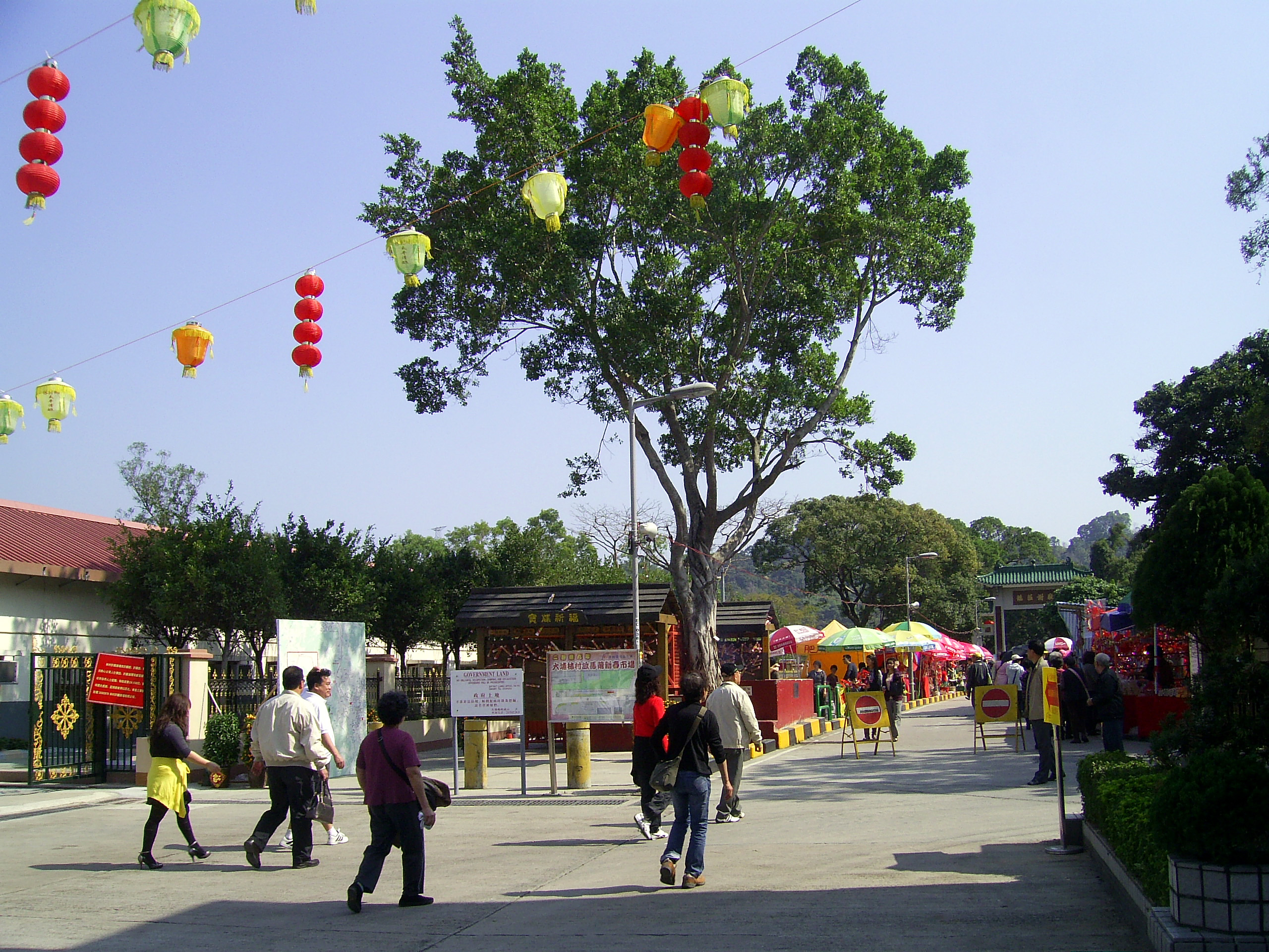 中文（香港）: 林村「小」許願樹